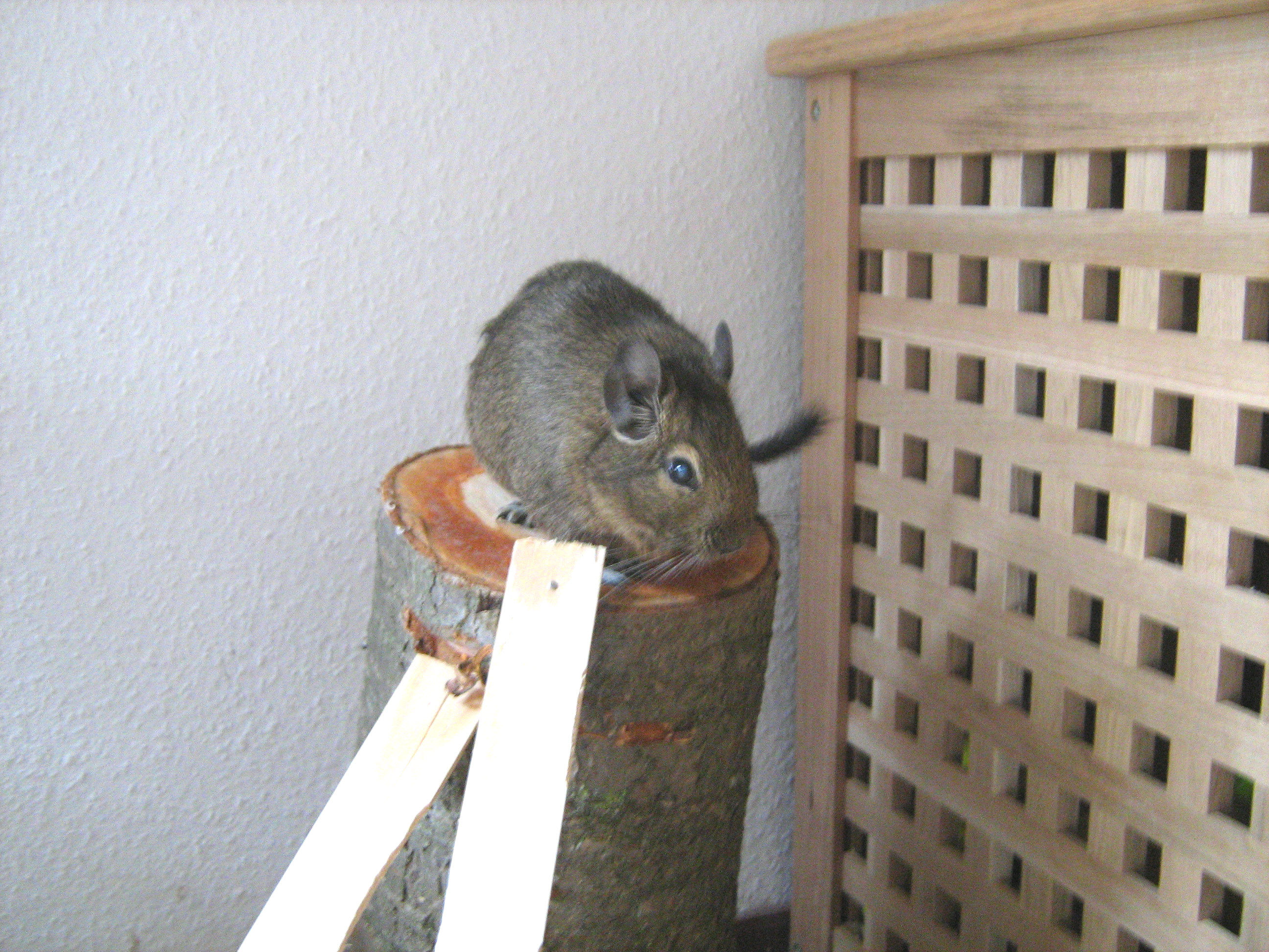 Octodon degu - de gewone degoe - op uitkijkpost